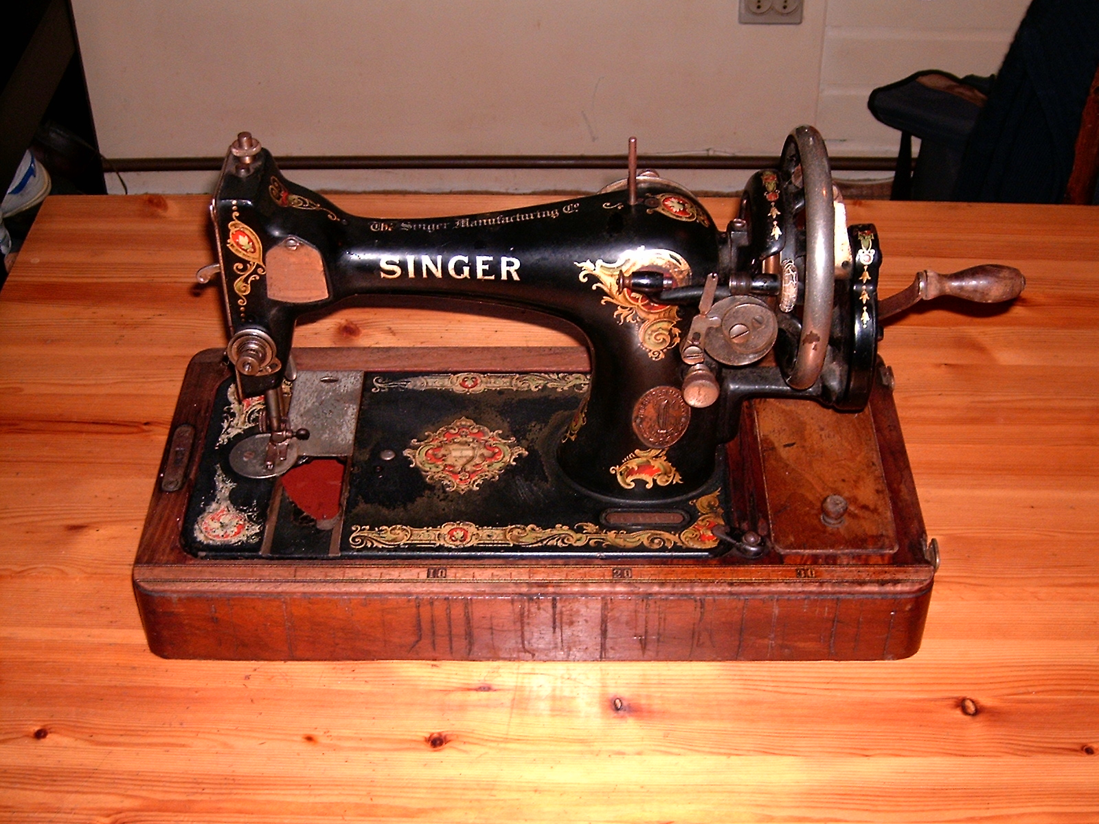 Singernaai Machine